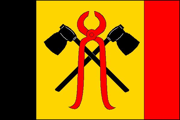 Vlajka obce Ludvíkov